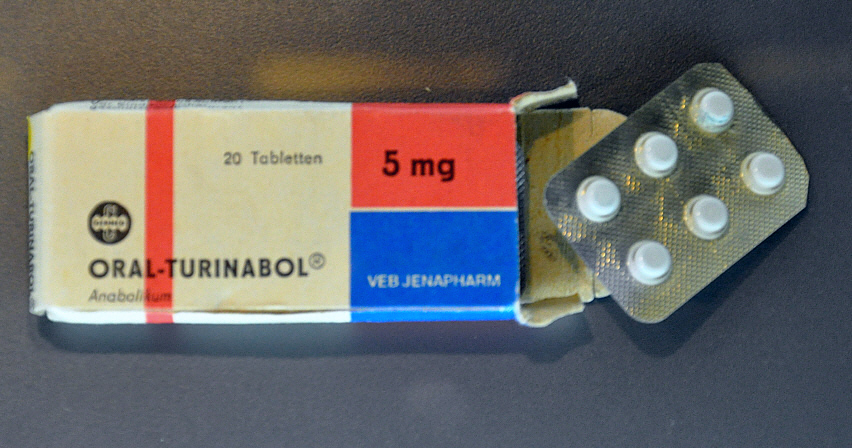 Packung Oral-Turinabol (Dopingmittel), fotografiert im DDR-Museum Berlin